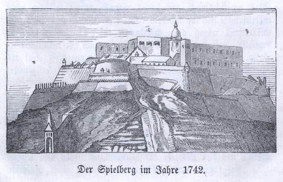 Der Spielberg im Jahre 1742